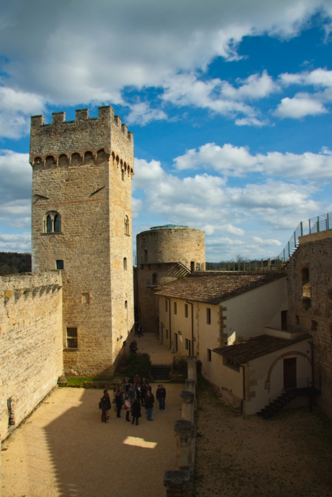 Interno del Castello di Staggia Senese